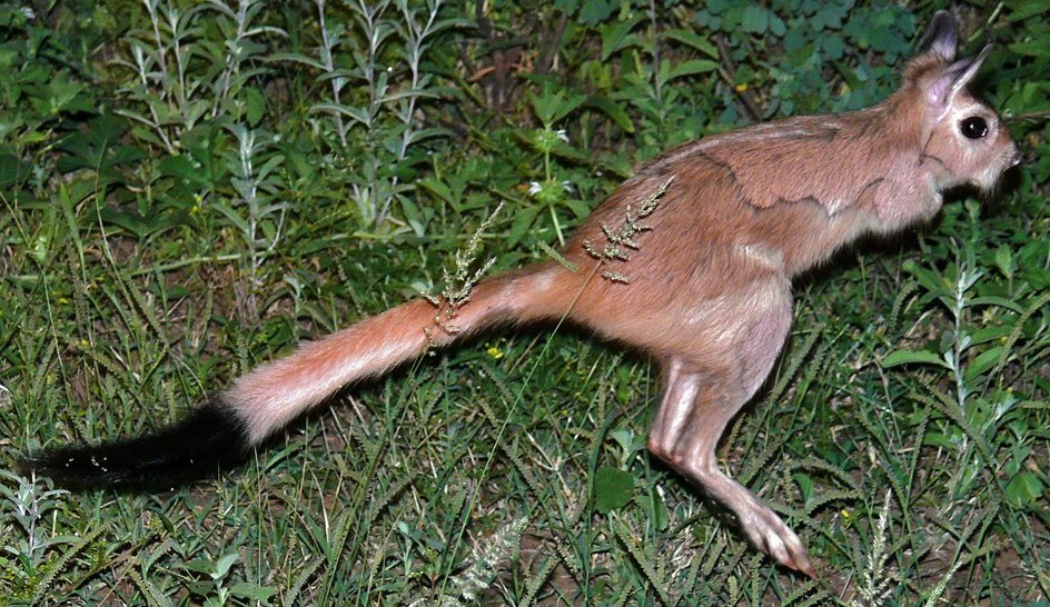 Letaba Night Drive, Kruger NP, SOUTH AFRICA